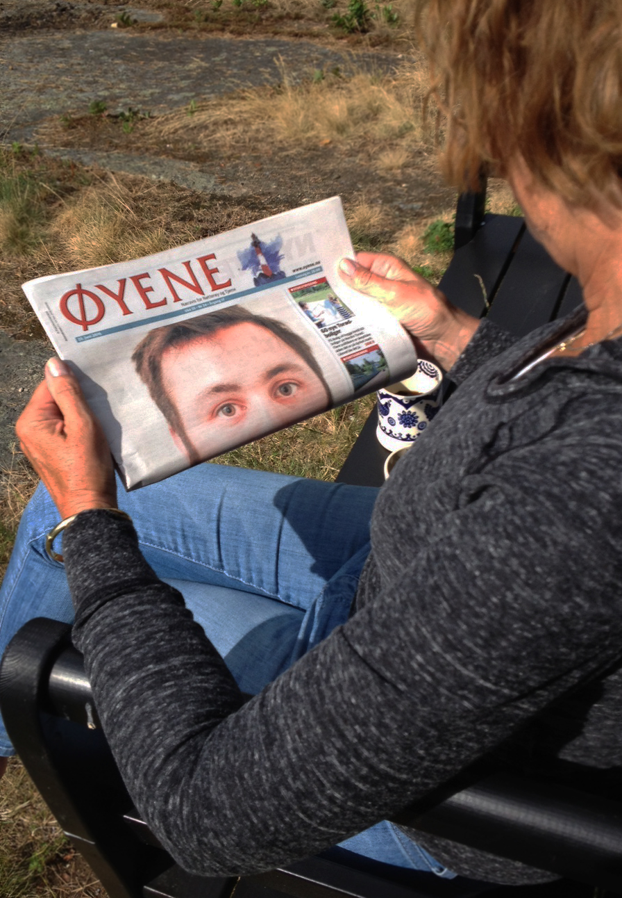 norsk lokalavis